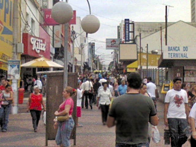 Convívio - Americana, São Paulo, Brasil